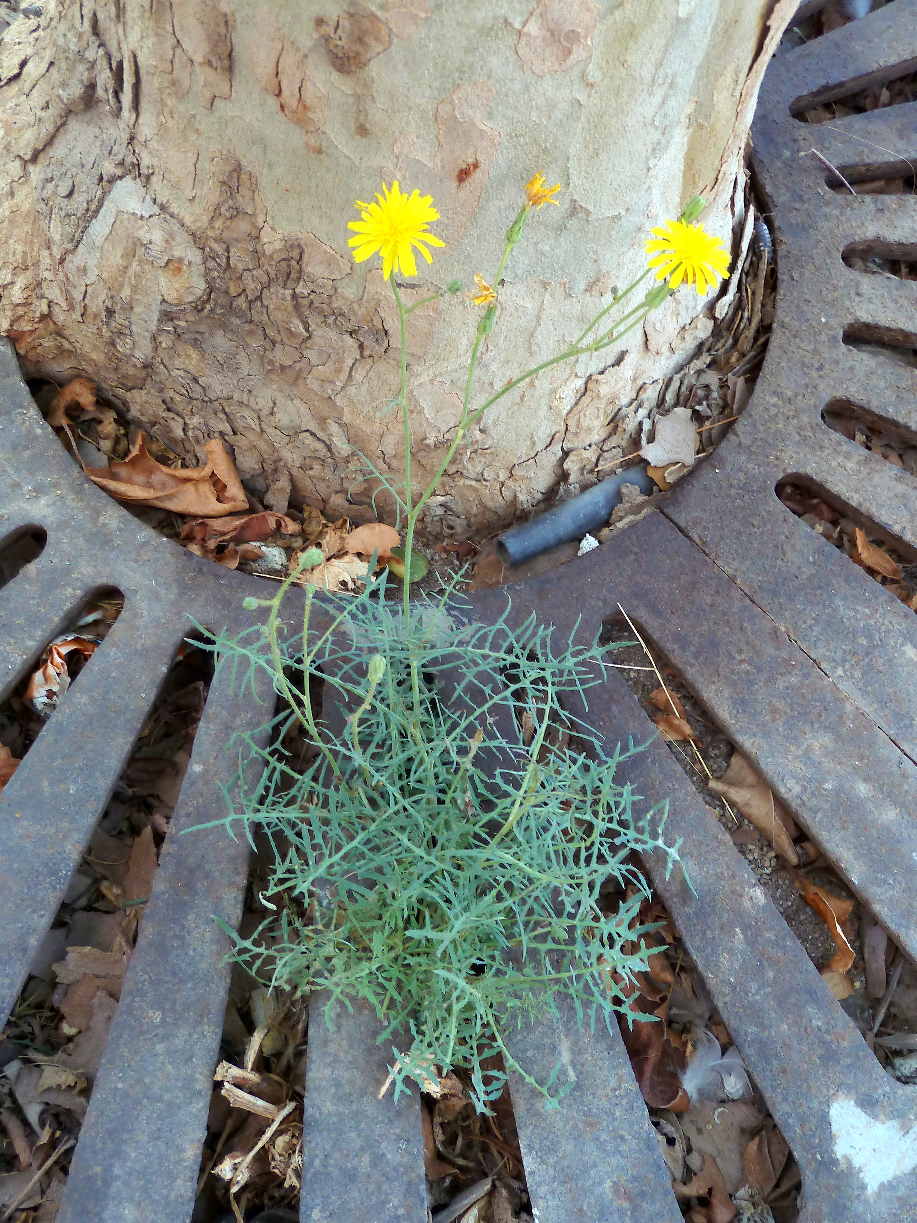 Sonchus tenerrimus - ( cerraja menuda, cerraja tierna,...) -Vista general de un individuo urbano creciendo en el alcorque de un platano (Platanus × hispanica). - Calle del Puerto de Poniente, Águilas (Provincia de Murcia, España).